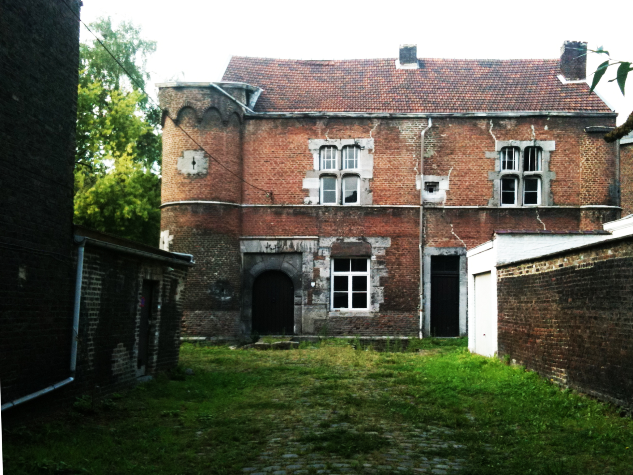 Manoir des Quatre tourettes, Saint-Léonard, Liège, Façade